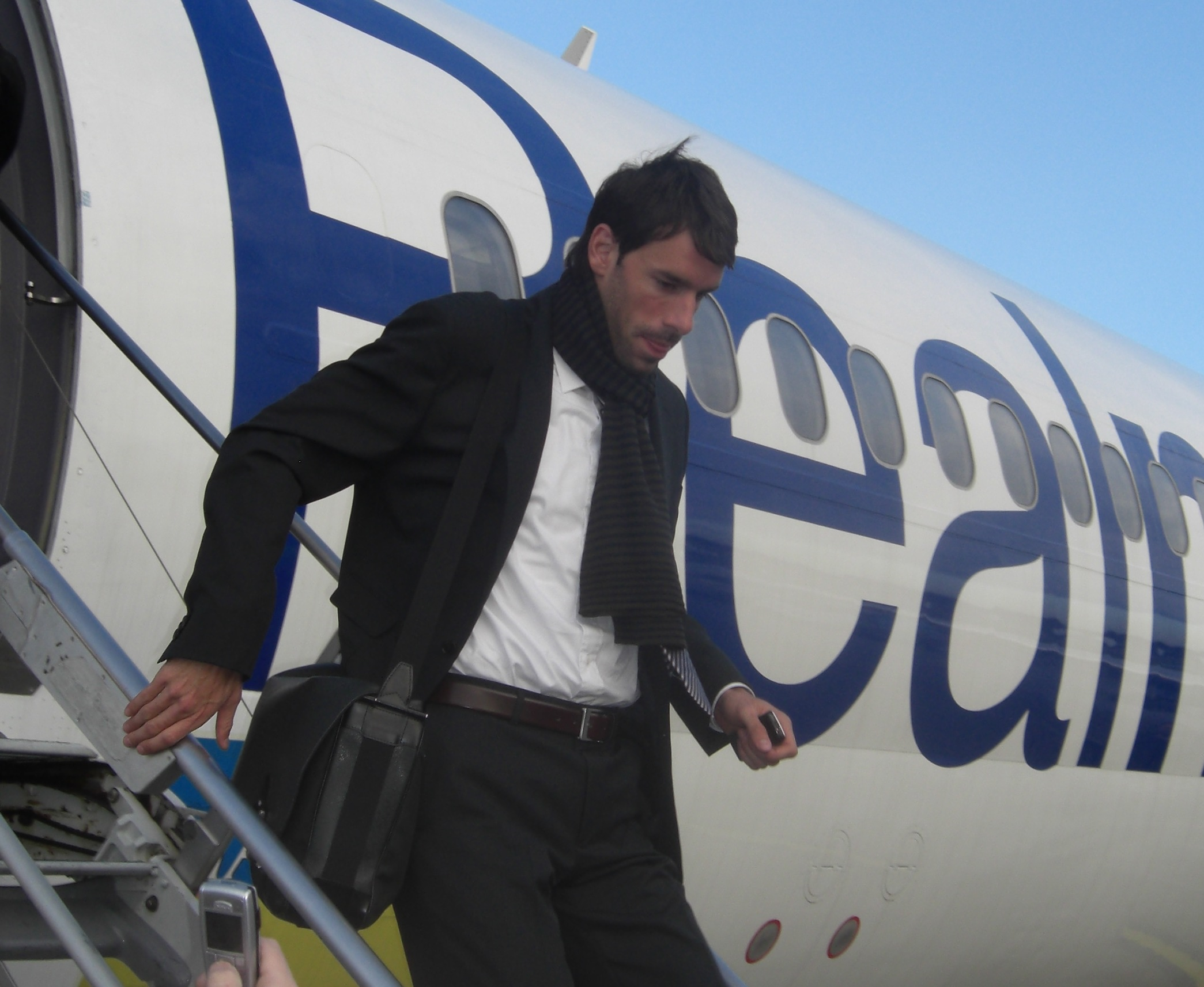 Ruud van Nistelrooy